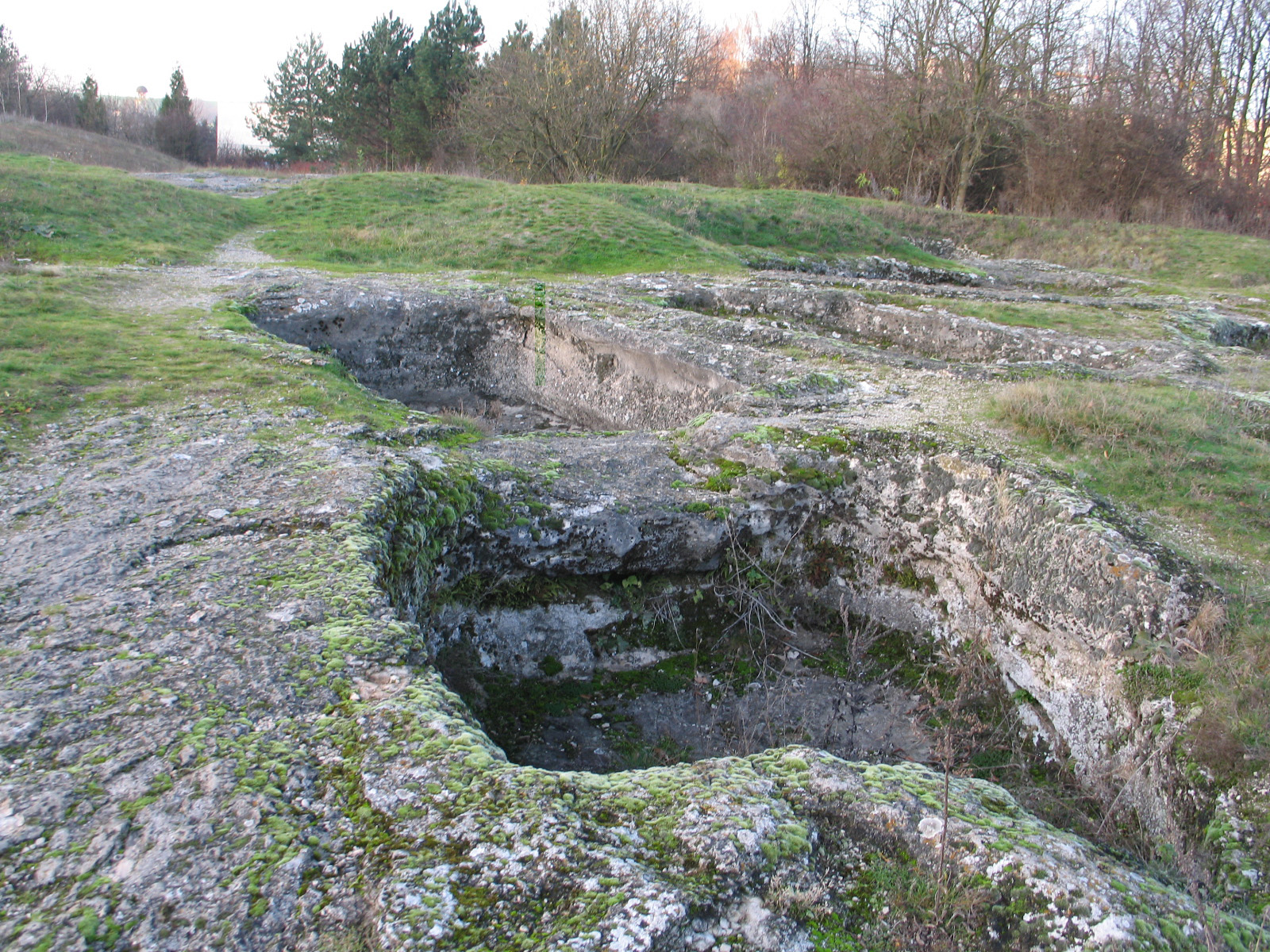 Vapencove tzv. rímske kúpele alebo močidla